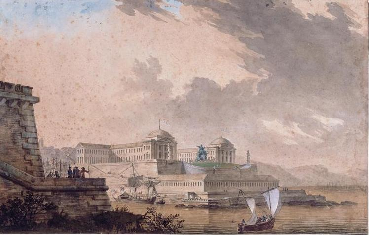 aquarelle, gouache, plume - 0.325 m x 0.540 m Paris, Musée du Louvre - INV. 27317